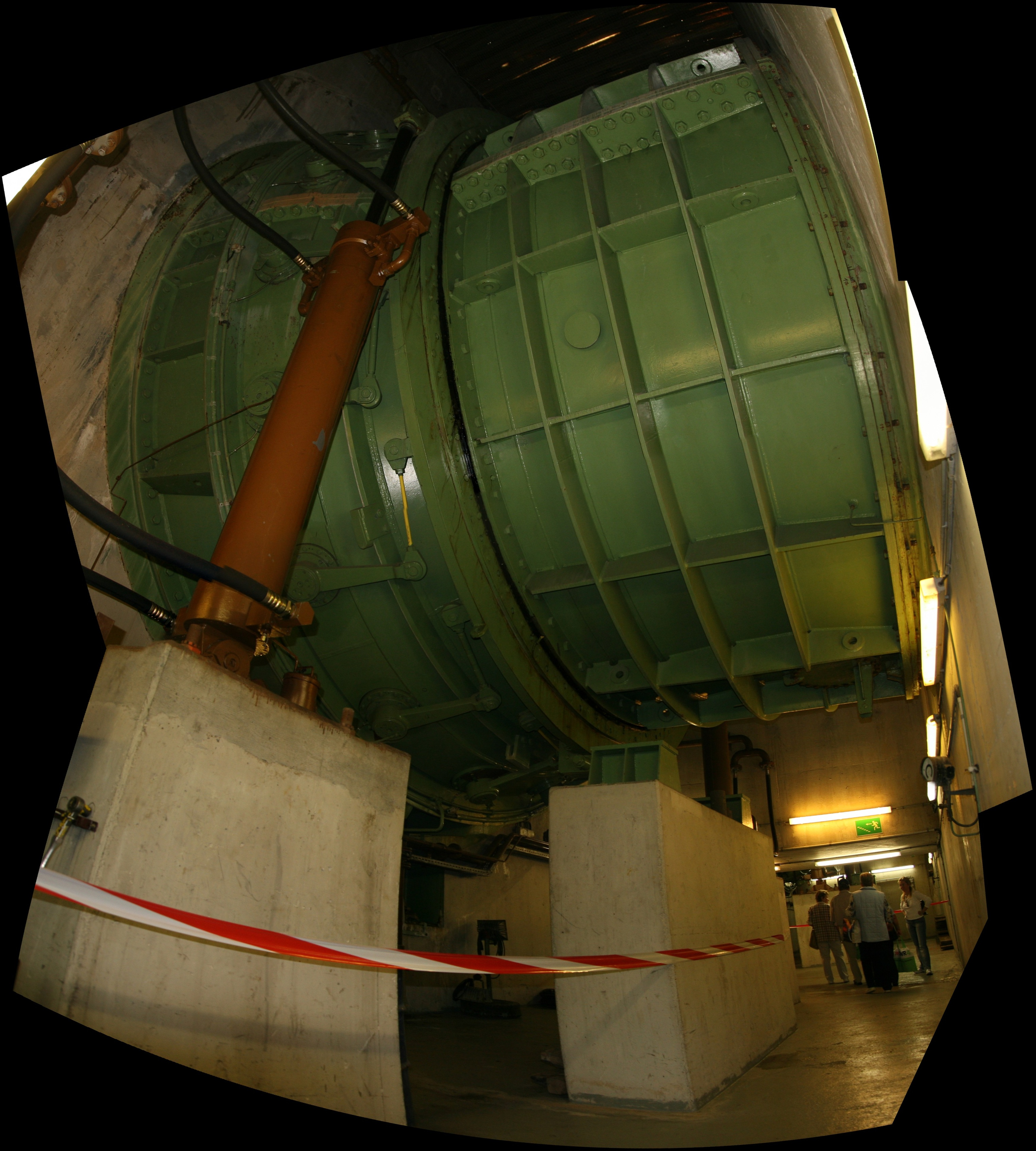 Die Turbine des Rheinkraftwerkes Iffezheim.Durch das grüne Rohr fließt der Rhein.